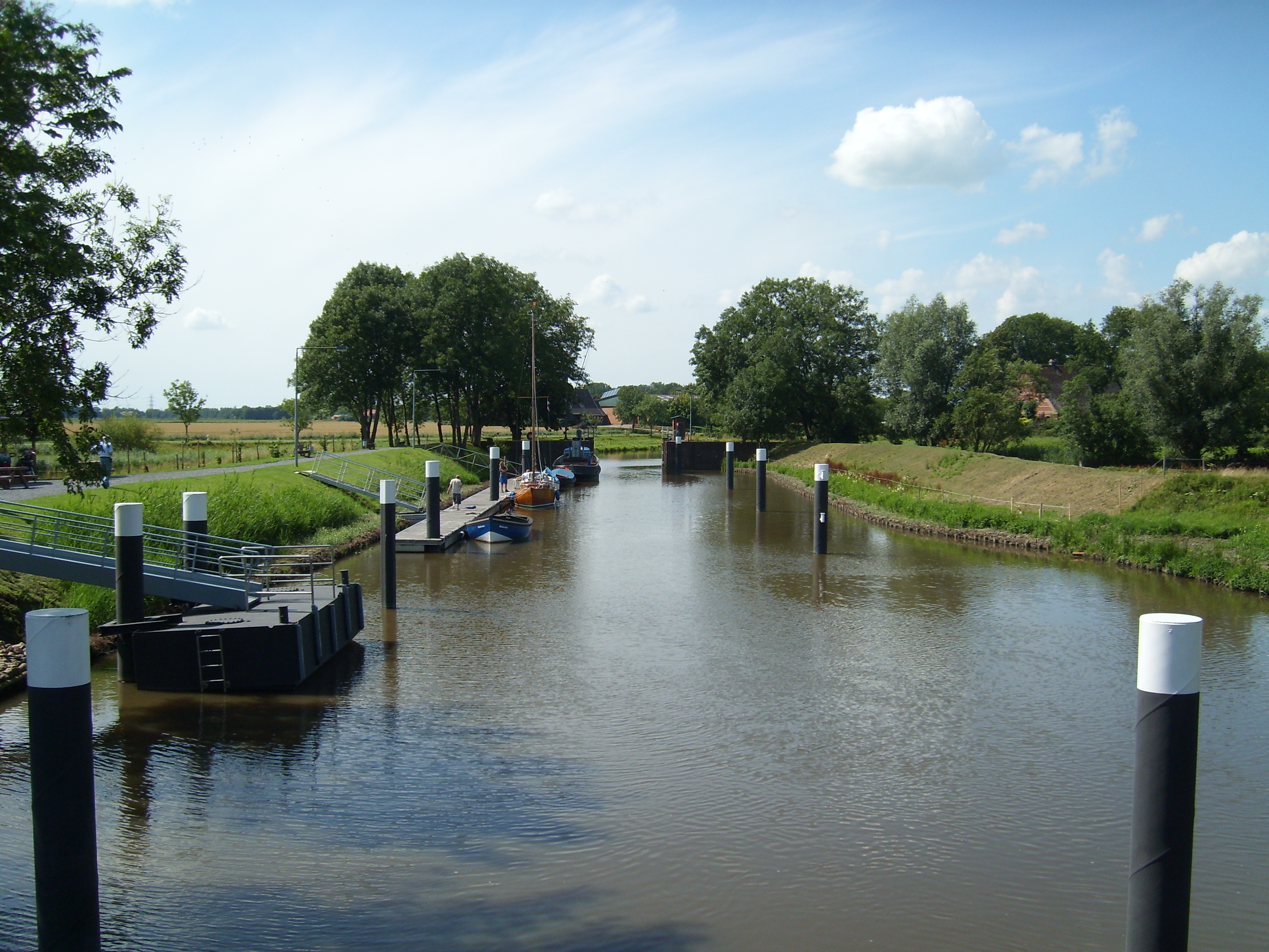 Die Schleuse Kasenort, die Stör und Wilsterau miteinander verbindet